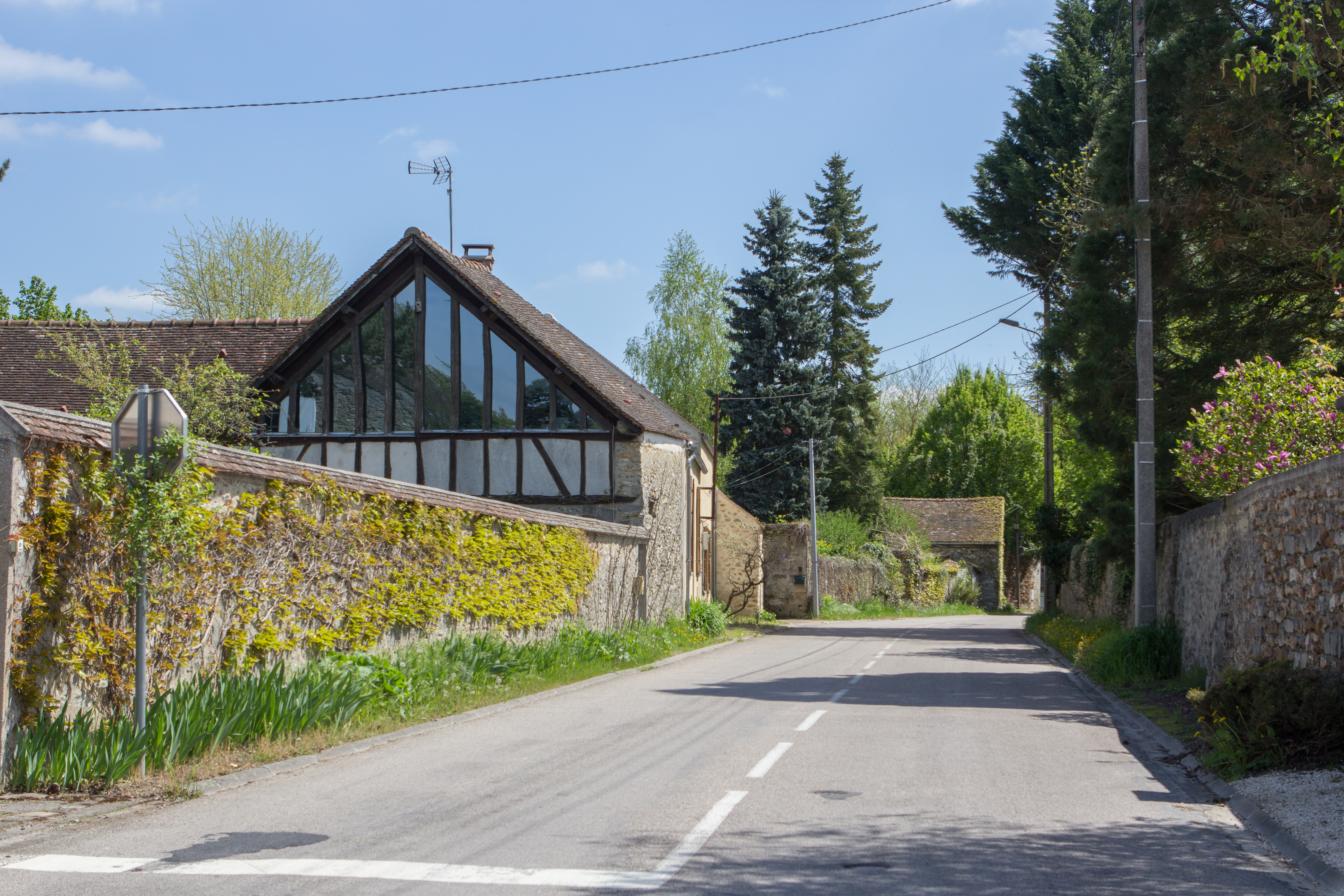 Hameau de Faÿ (Commune de Chailly-en-Bière, Seine-et-Marne, France)